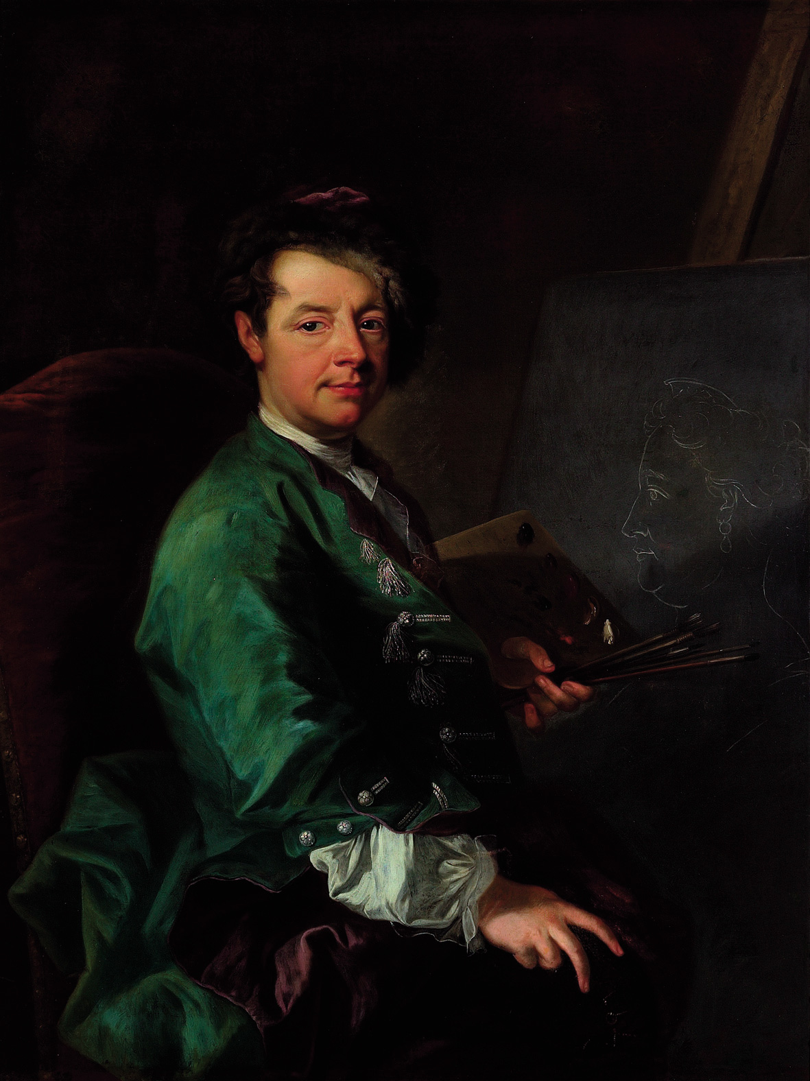 Selbstporträt vor der Staffelei mit dem Profilbildnis der Kaiserin Elisabeth Christine (1697-1753), Mutter der Kaiserin Maria Theresia